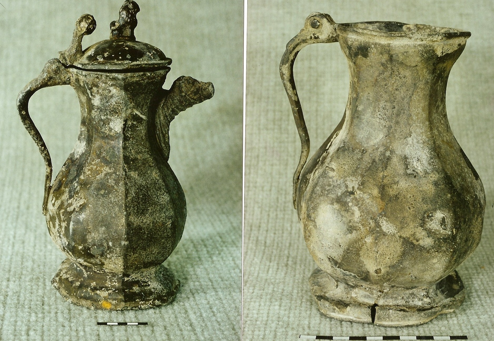 Mesures en étain XIVe siècle